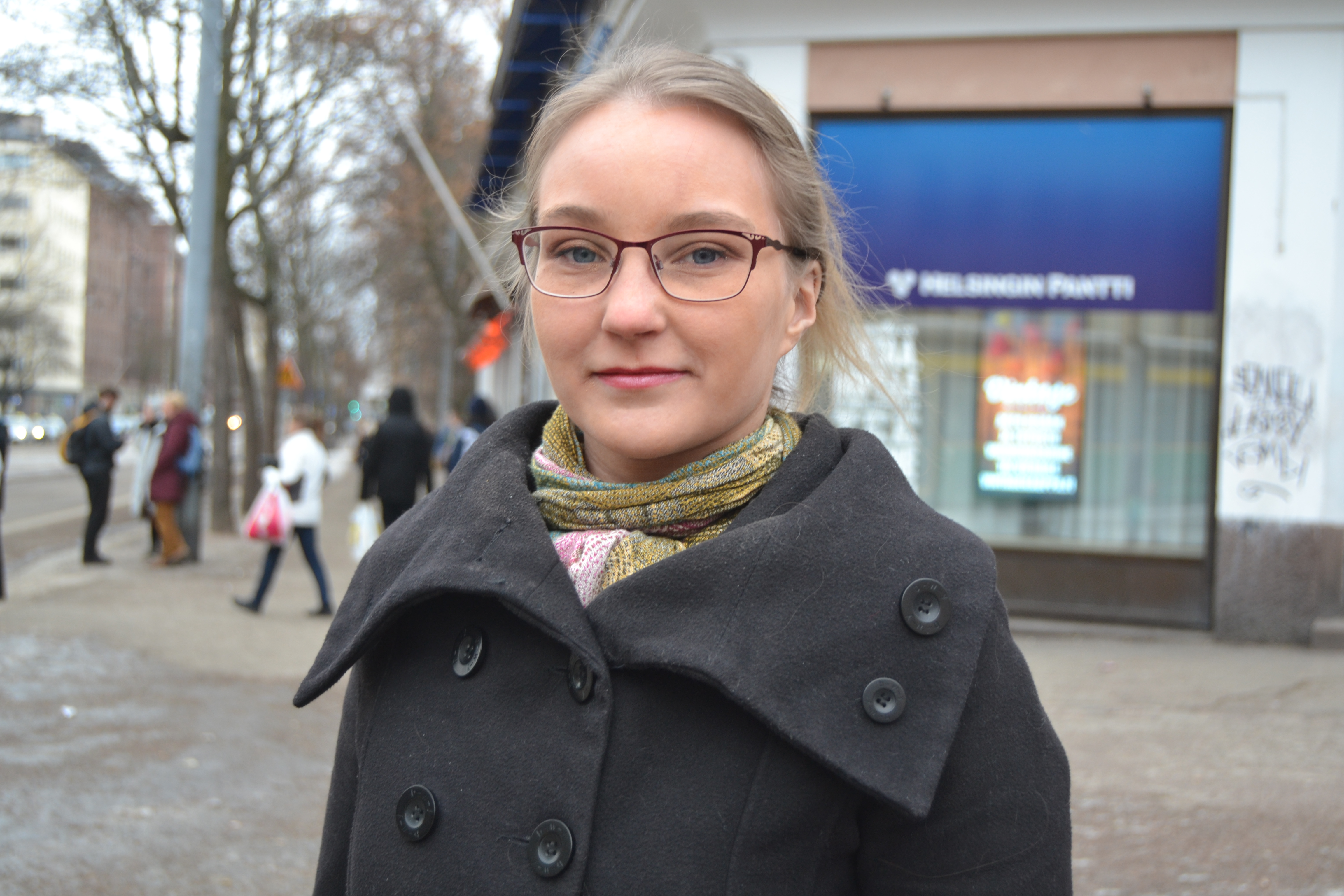 Piraattipuolueen puheenjohtaja Jonna Purojärvi Helsingissä 11. helmikuuta 2017